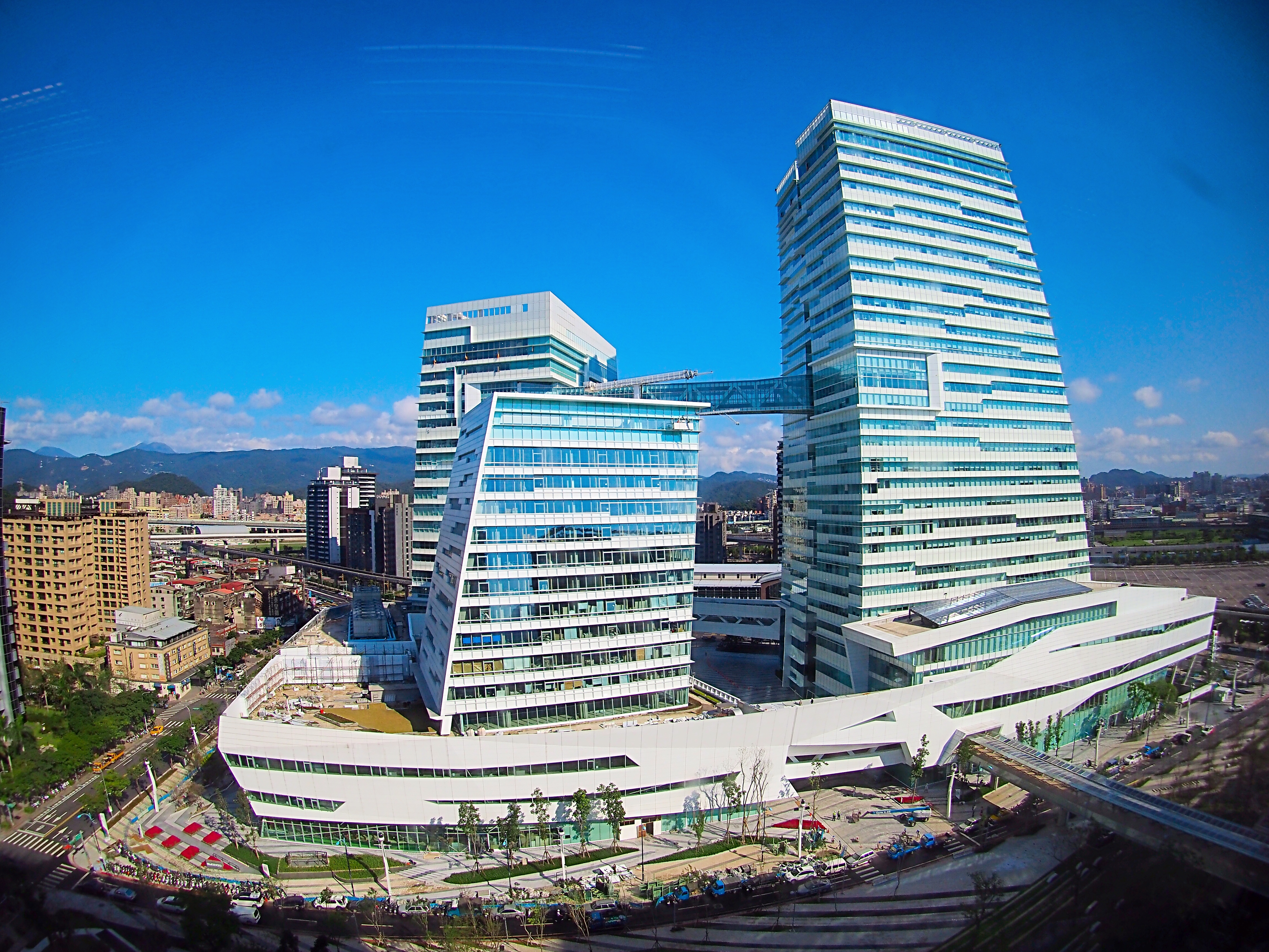 中文（台灣）: 俯瞰接近完工的中國信託金融園區。